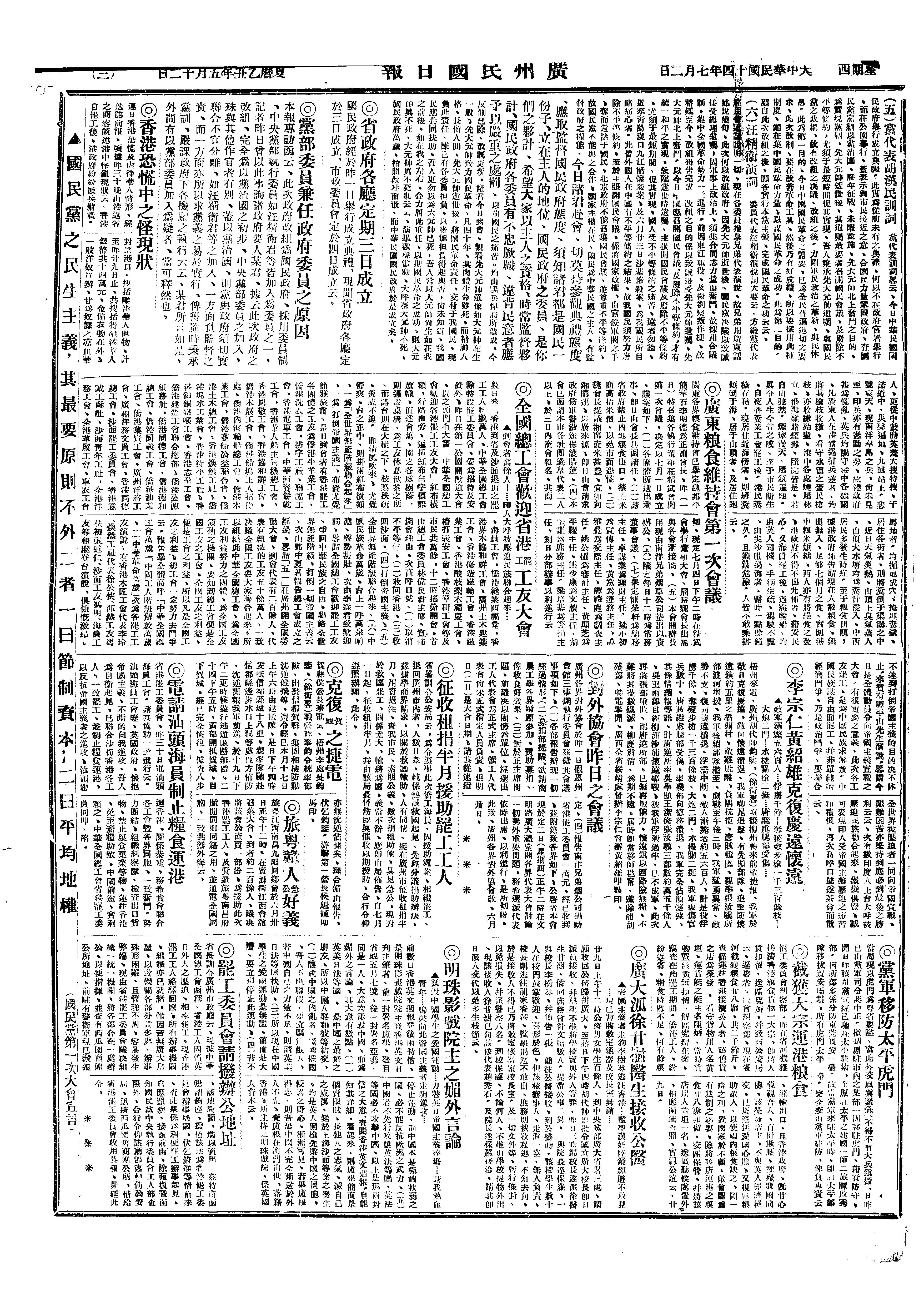 中華民國十四年（1925年）七月二日《廣州民國日報》第三版，刊有《國民政府成立典禮盛況》。